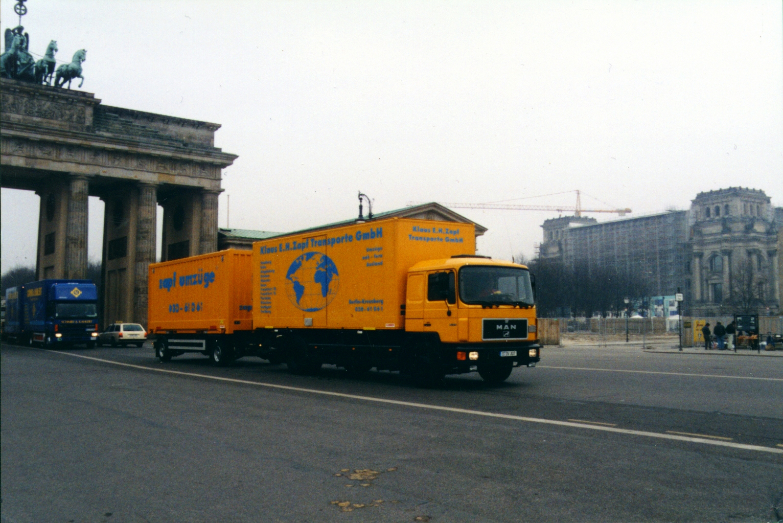 zapf umzüge AG, 1975 gegründete internationale Umzugsfachspedition mit Sitz in Berlin und Filialen in sieben weiteren Städten. Firmen-LKW beim Brandenburger Tor, Berlin.